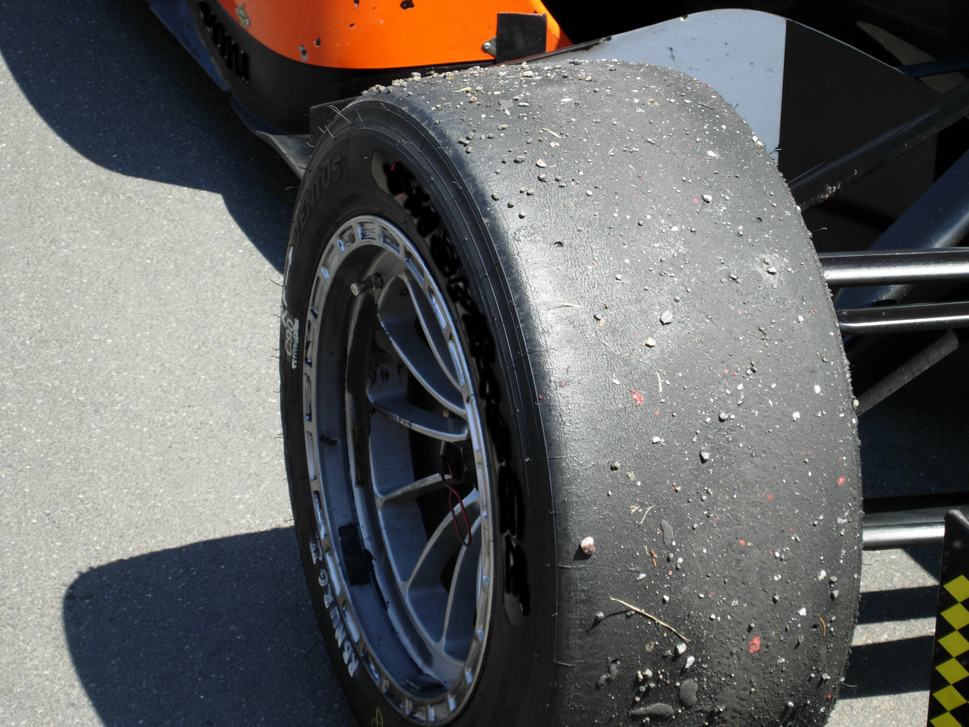 Rennreifen Slicks Formel3 profillos (Zustand nach Renndistanz)